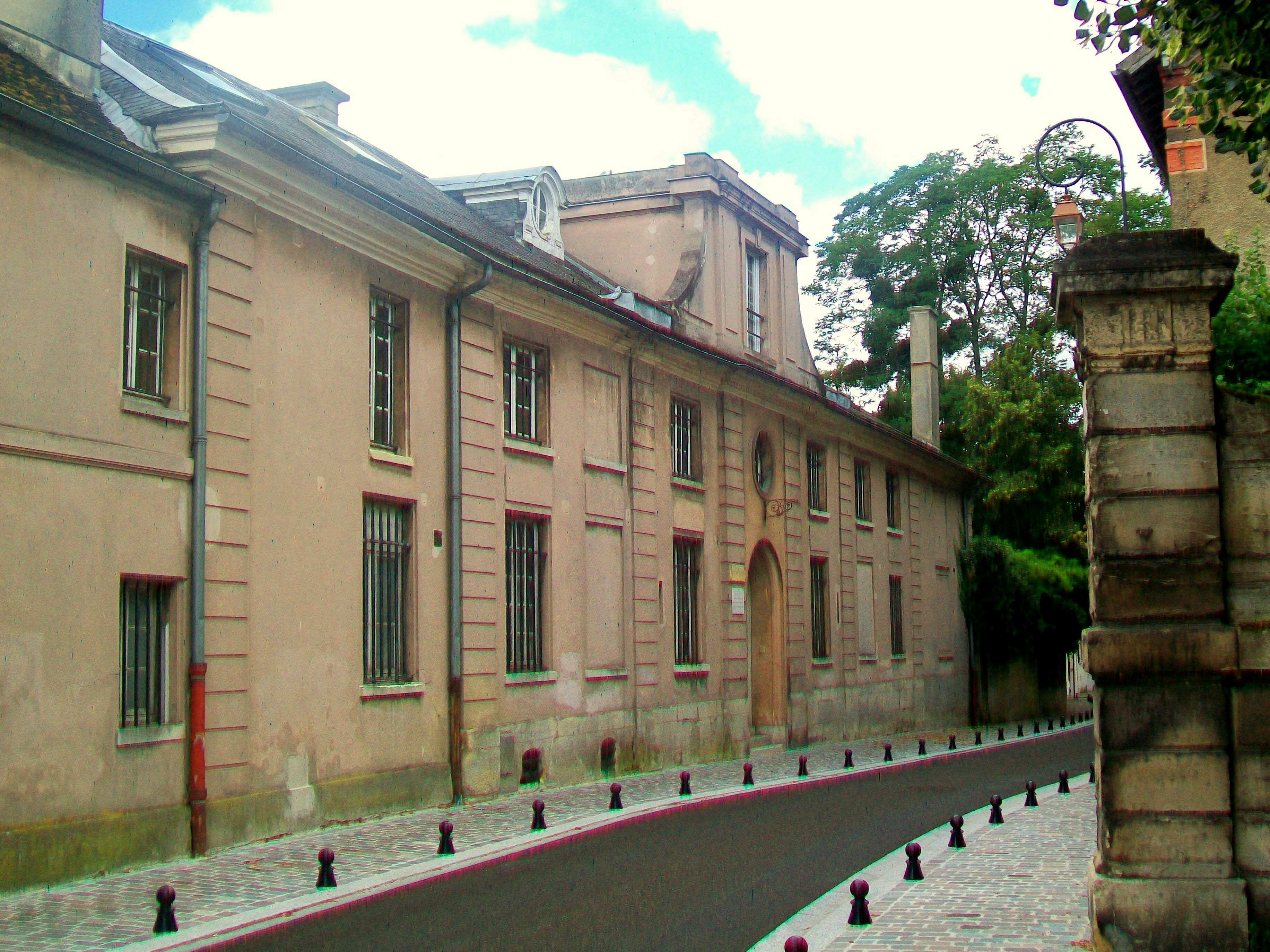 Pavillon Colombe, maison de plaisance de 1770 dans le style néoclassique, architecte François-Joseph Belanger, façade nord sur la rue Edith-Wharton.